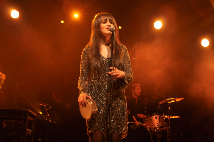 Camélia Jordana au cours de son concert au Normandy à Sain,t-Lô le 27 novembre 2010, accompagnée par le musicien Frédéric Jean.